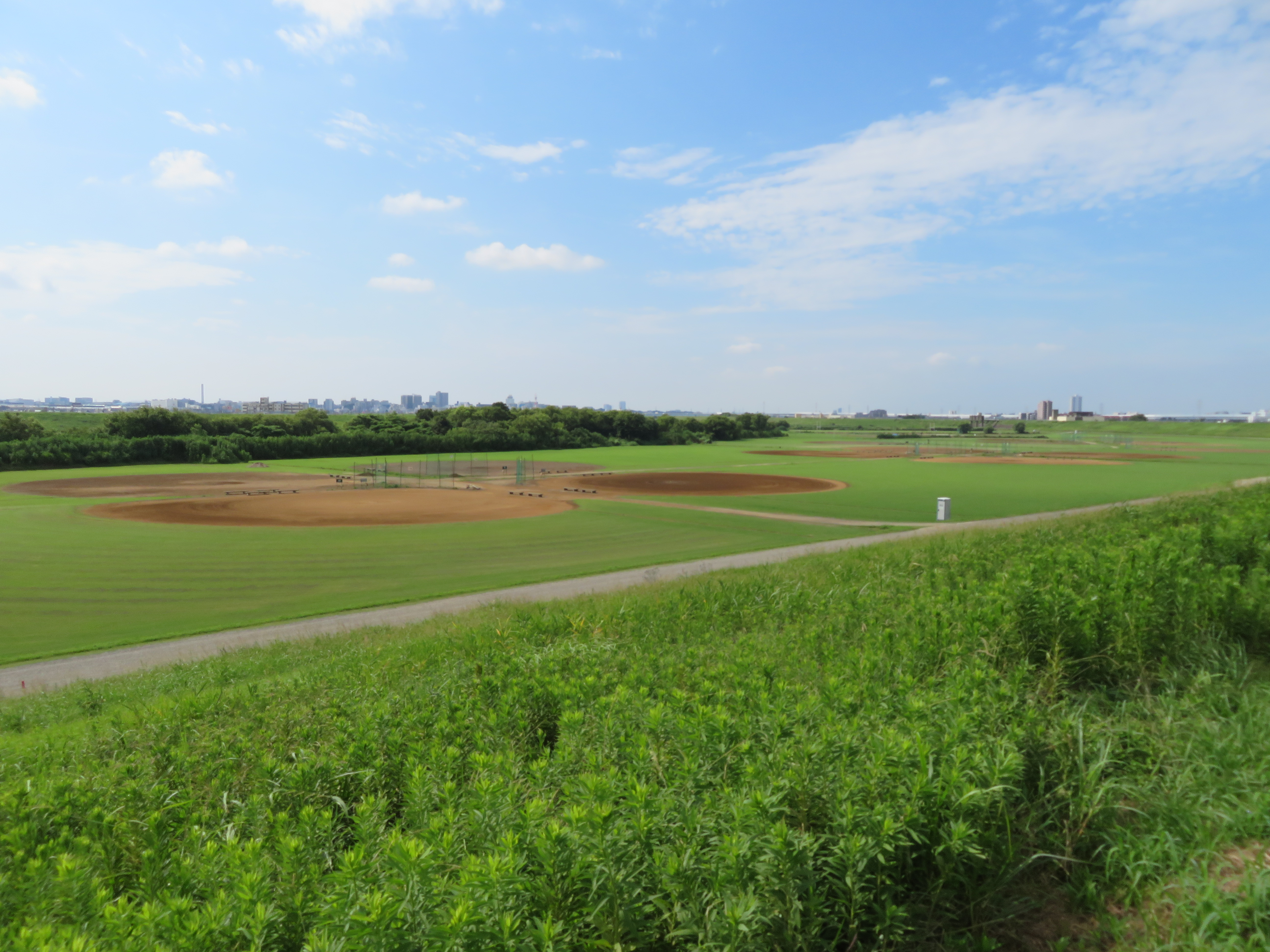 埼玉県三郷市に所在するサンケイスポーツセンターグラウンドの一部 Canon PowerShot SX720 HS